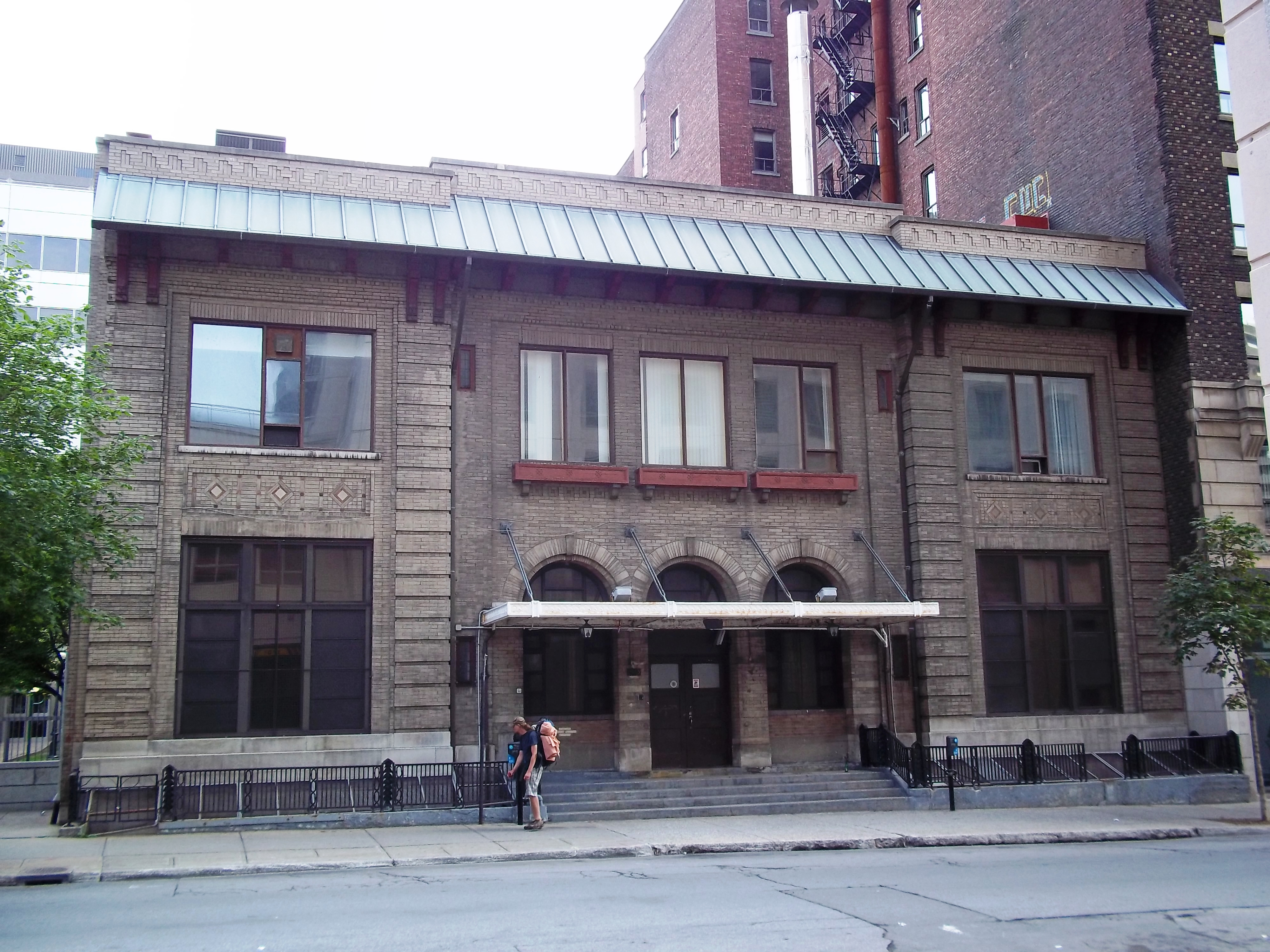 (Ancien) NCSM Donnacona, 2055, rue Drummond, Montréal - info